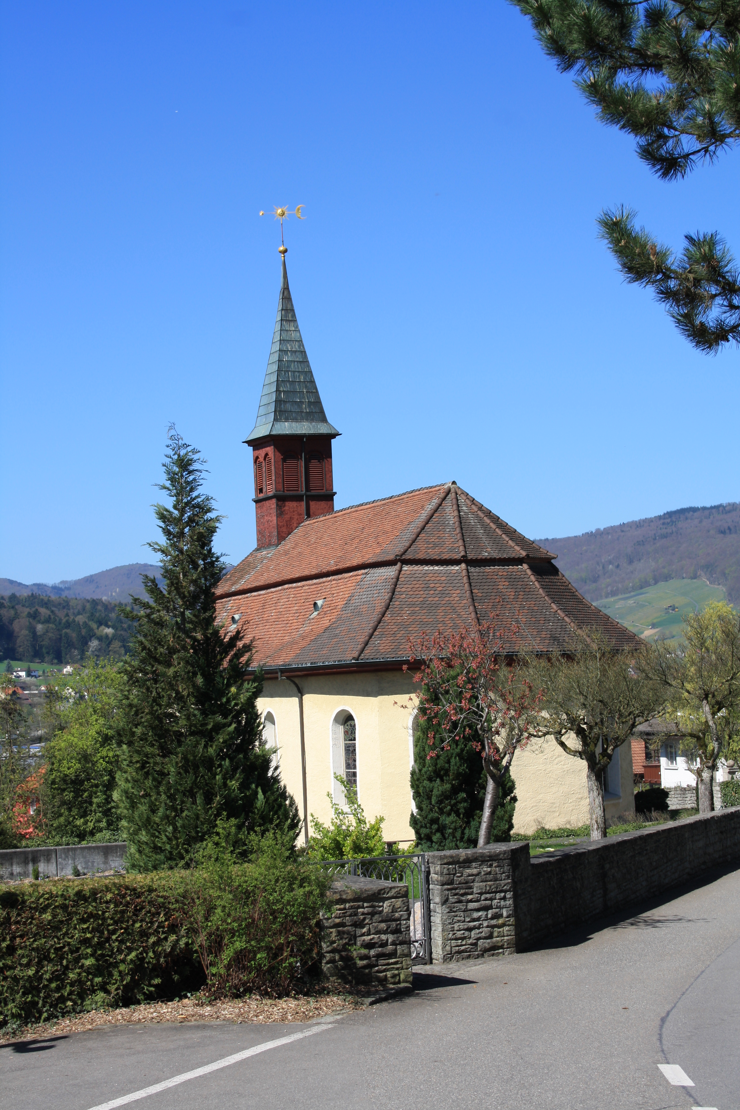 Reformierte Kirche Holderbank